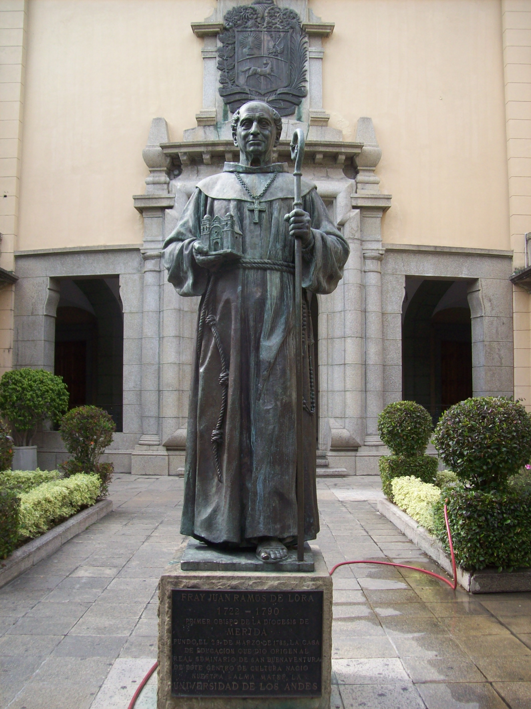 Estatua de Fray Juan Ramos de Lora situada en el patio principal del rectorado de la Universidad de Los Andes (ULA), en Mérida (Venezuela). Fue inaugurada el 21 de septiembre de 1960.